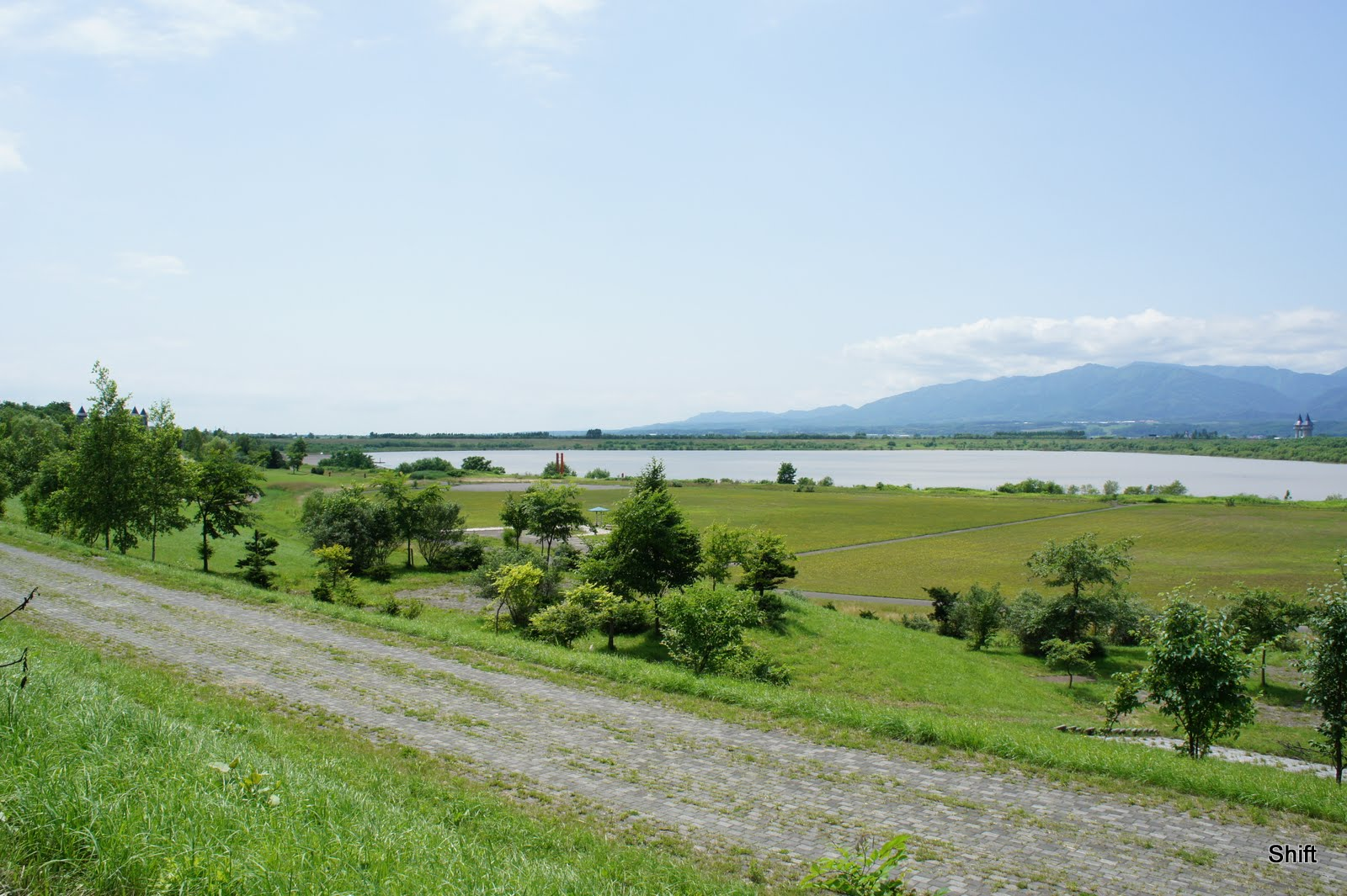 [北海道] 昼食を食べた砂川で、裏庭に回ると広がる景色が。石狩川の河川敷、でしょうか。広がる景色、あおいそら。